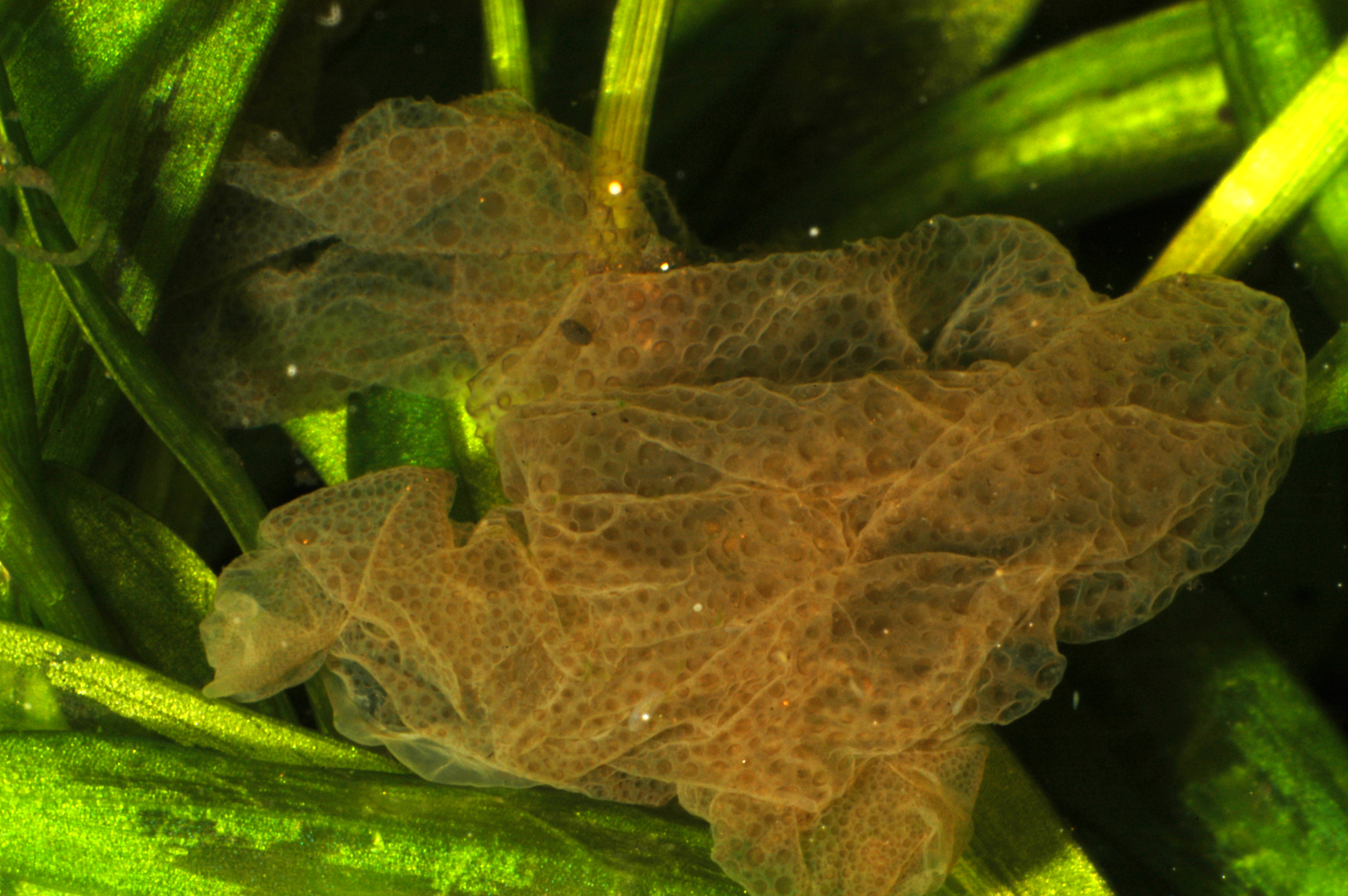 Vervelling Hymenochirus boettgeri